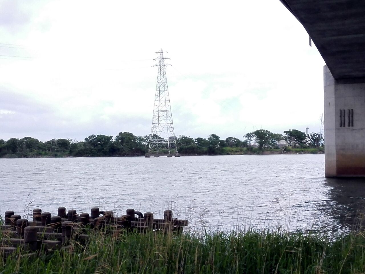 阿賀のかけはしの中洲